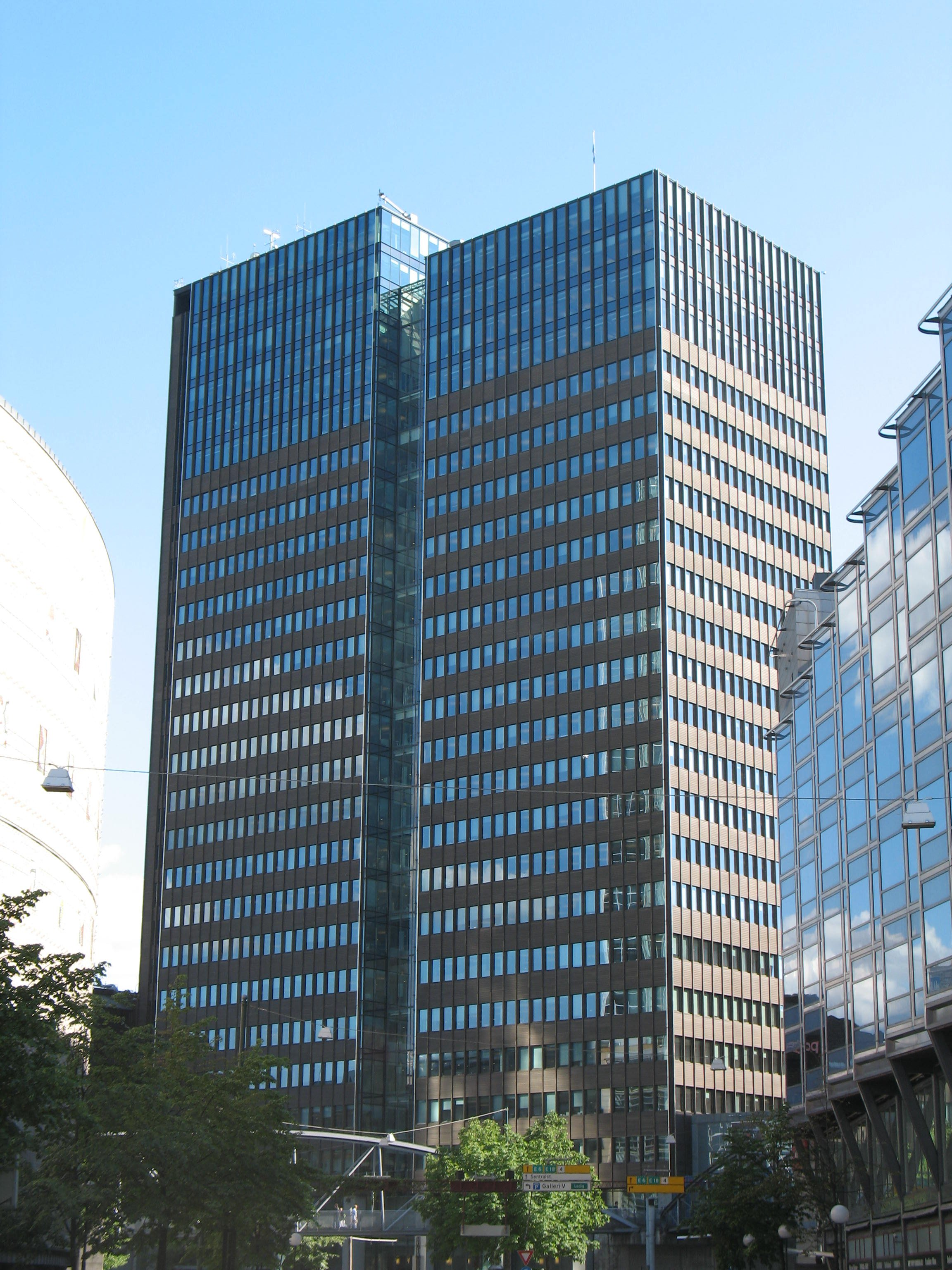 Postgirobygget i Oslo, sett fra Gunerius.